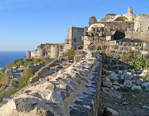 Ruines du château du Margat